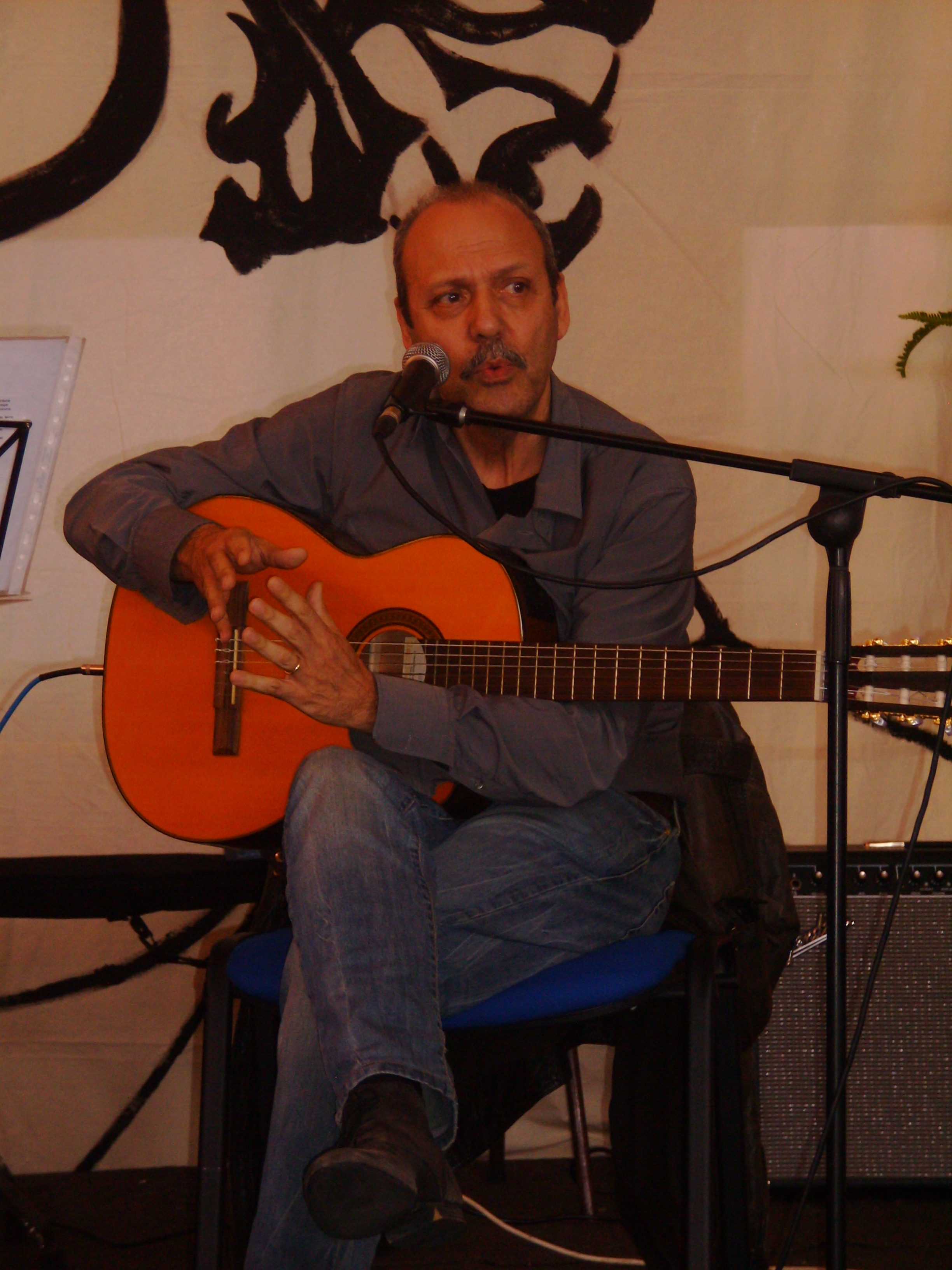 Carlos Mendes, convidado, na Escola Básica e Secundária de Santa Maria (Vila do Porto, ilha de Santa Maria, Açores), como parte do evento "Festejar Abril em Maio" promovido pelo Clube Asas do Atlântico.